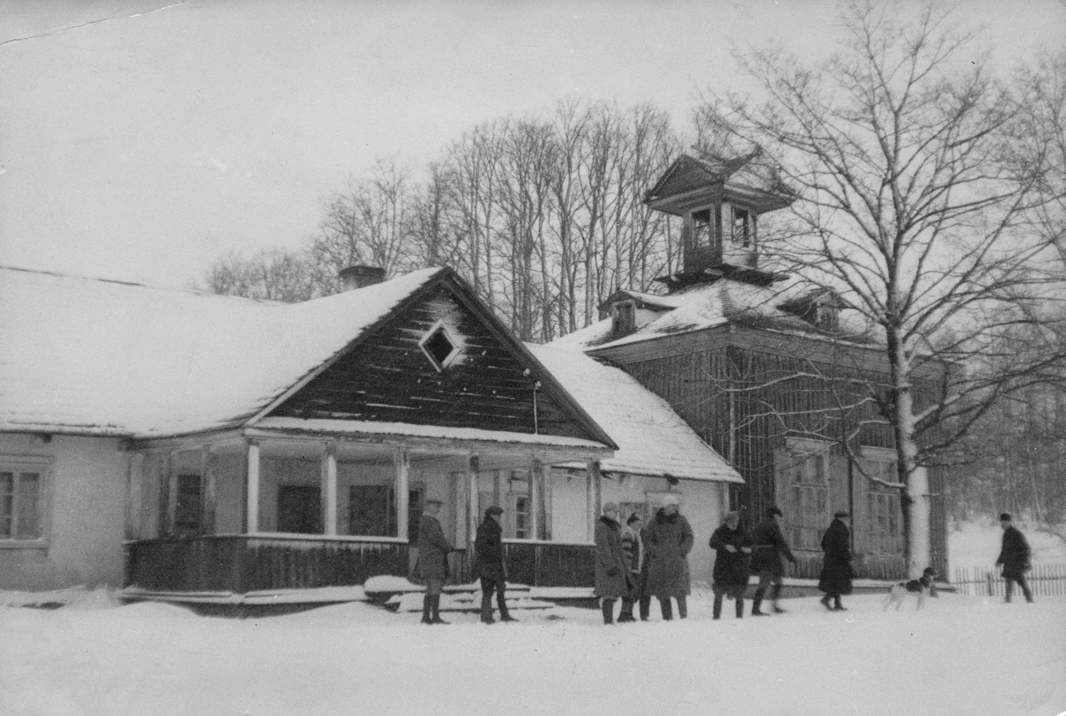 Беларуская (тарашкевіца): Галубічы (Hałubičy). Сядзіба